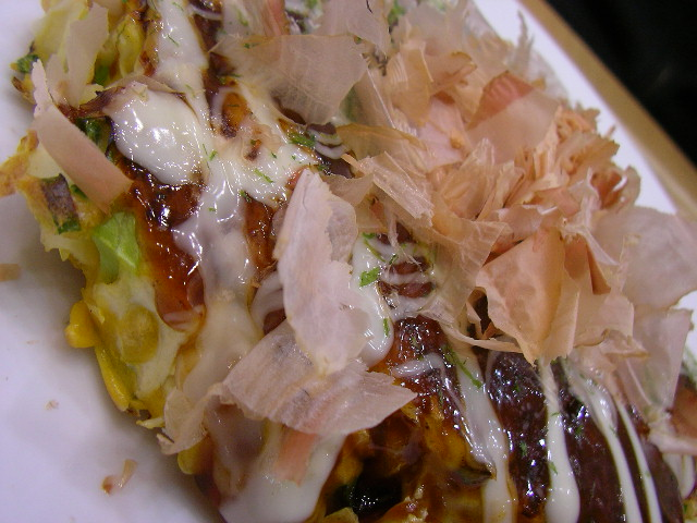 Okonomiyaki